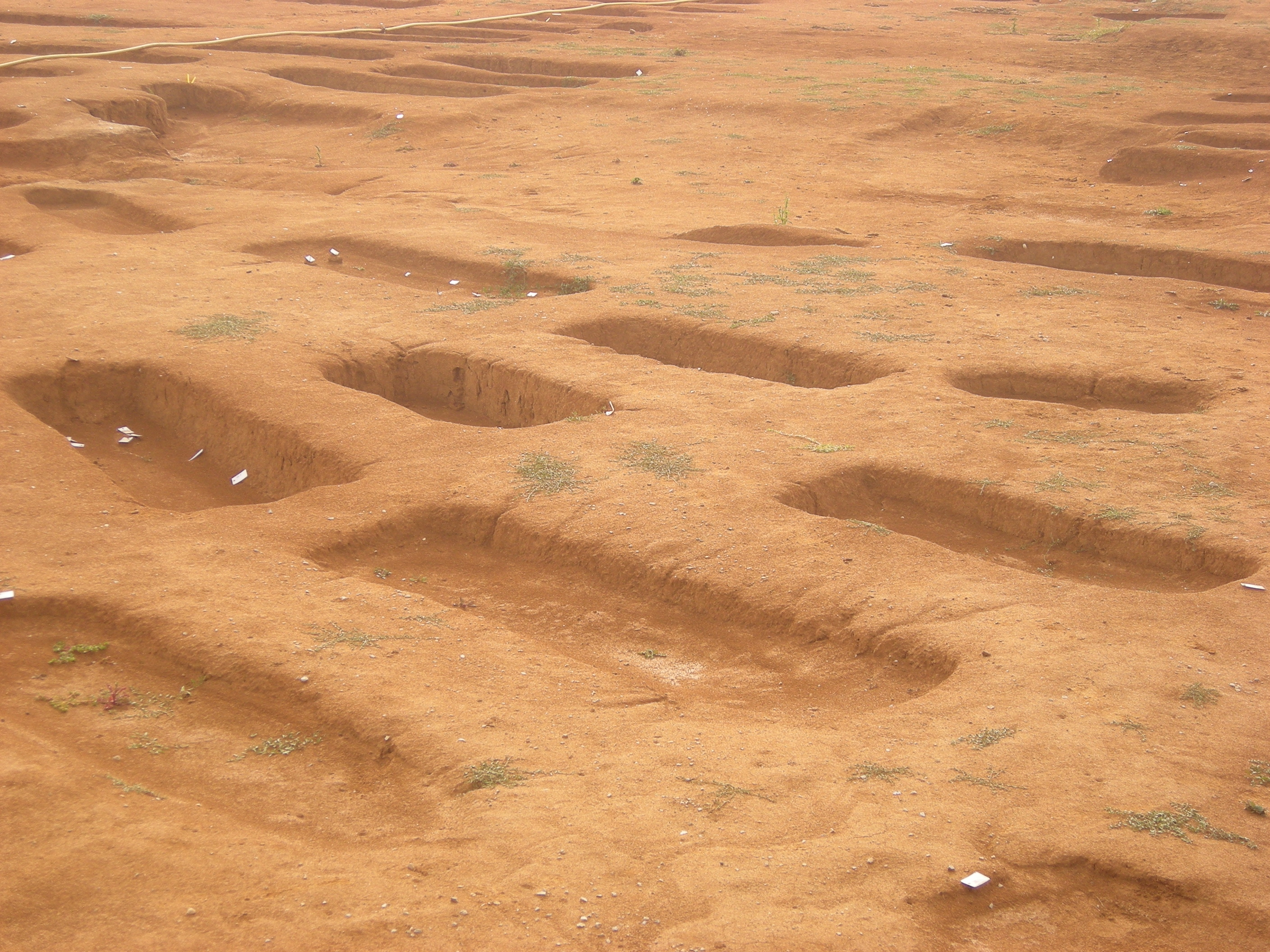 Nécropole mérovingienne de Saint Laurent des Hommes en Dordogne.